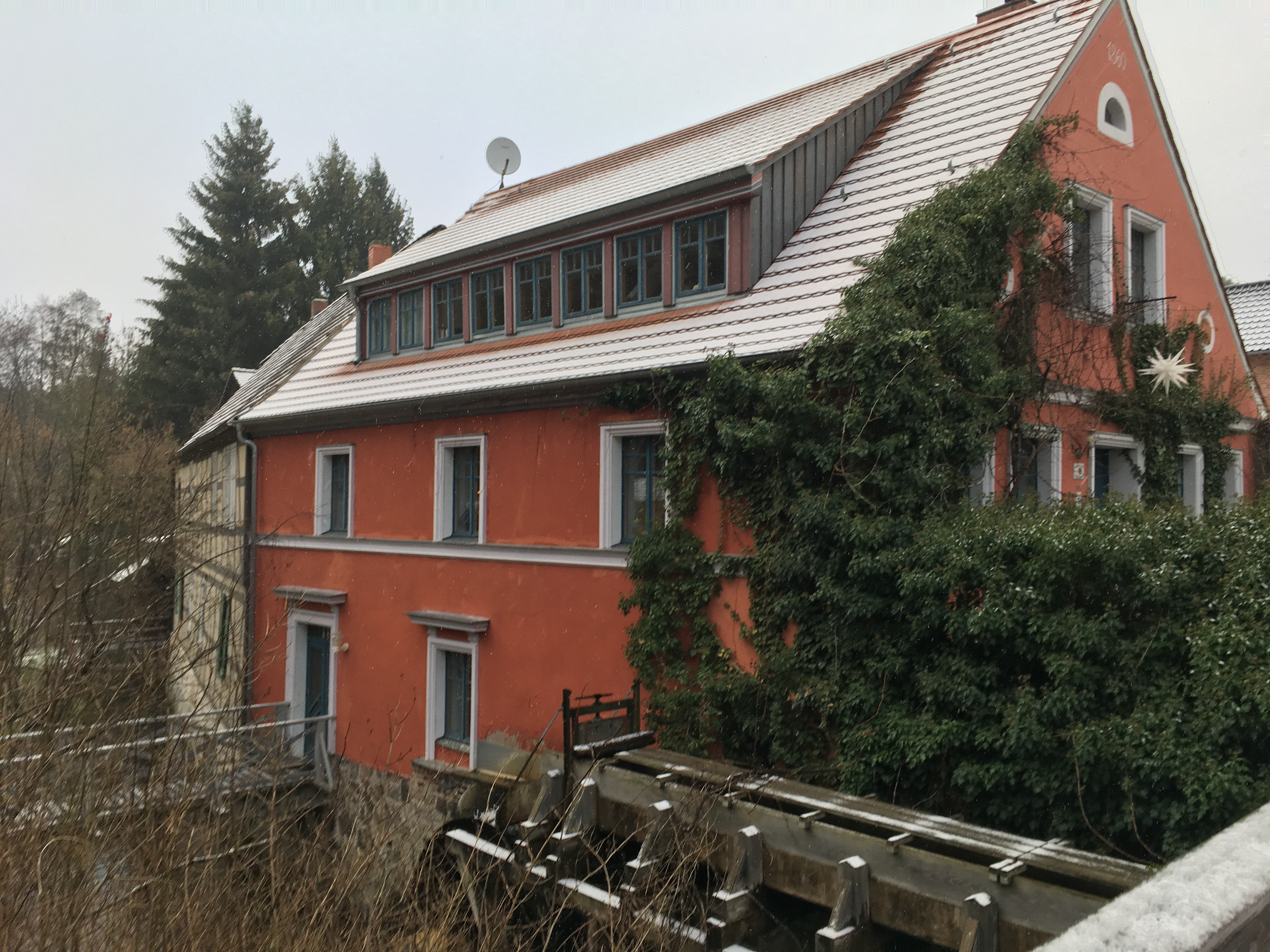 Die Hermannsmühle ist ein denkmalgeschütztes Bauensemble in Bardenitz, einem Ortsteil der Stadt Treuenbrietzen im Landkreis Potsdam-Mittelmark.